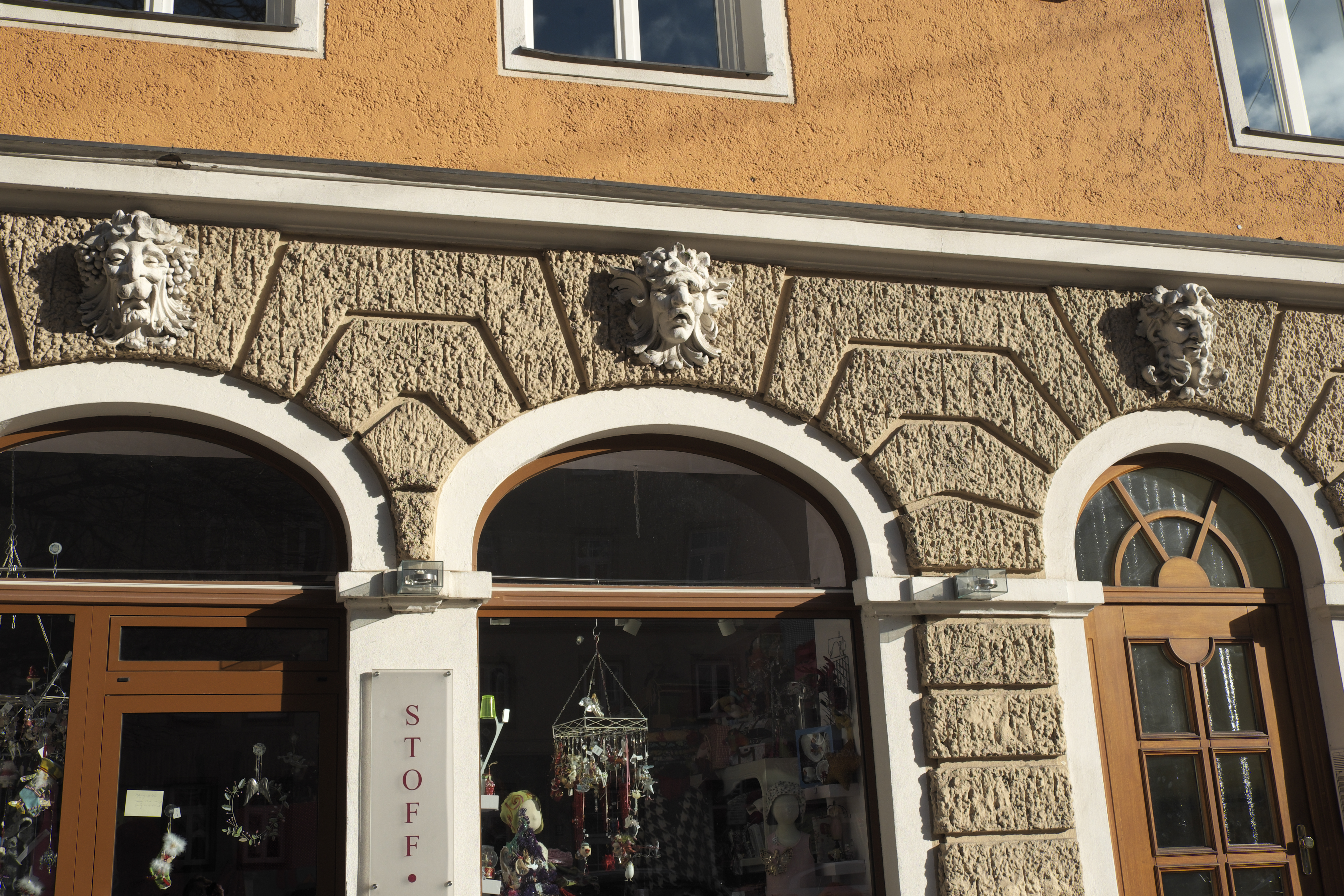 Mietshaus in der Wörthstraße 17 in Haidhausen im Stadtbezirk Au-Haidhausen in München (Bayern/Deutschland), um 1890